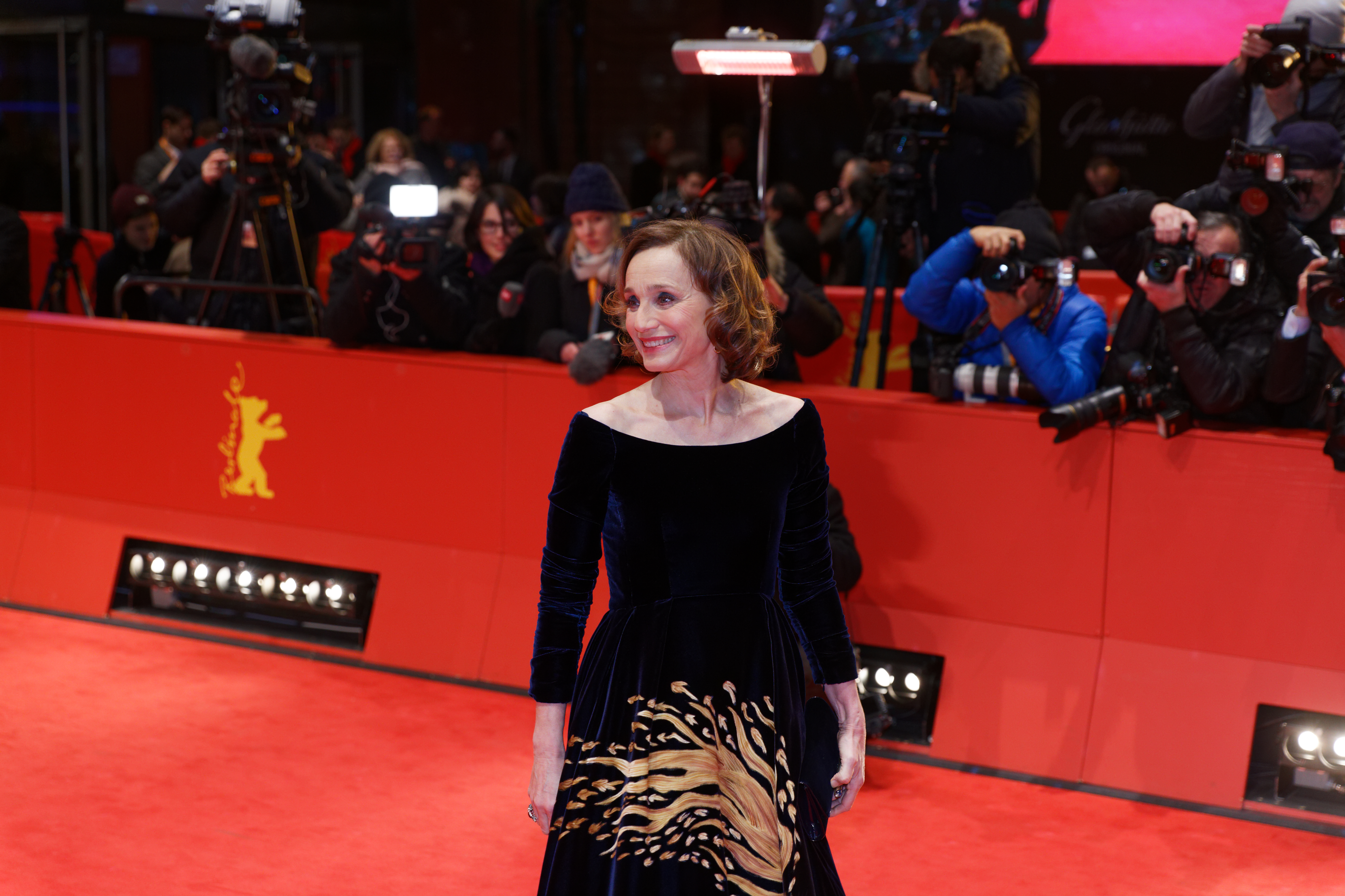 Kristin Scott Thomas bei der Weltpremiere von The Party im Rahmen der Berlinale 2017